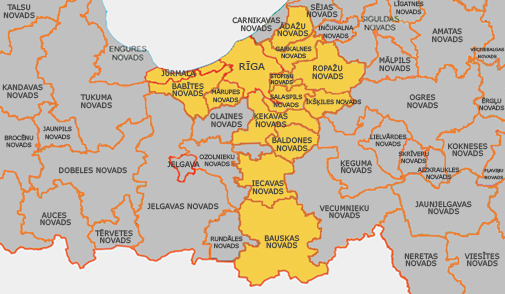 Interneta Pasaule tīkls Latvija